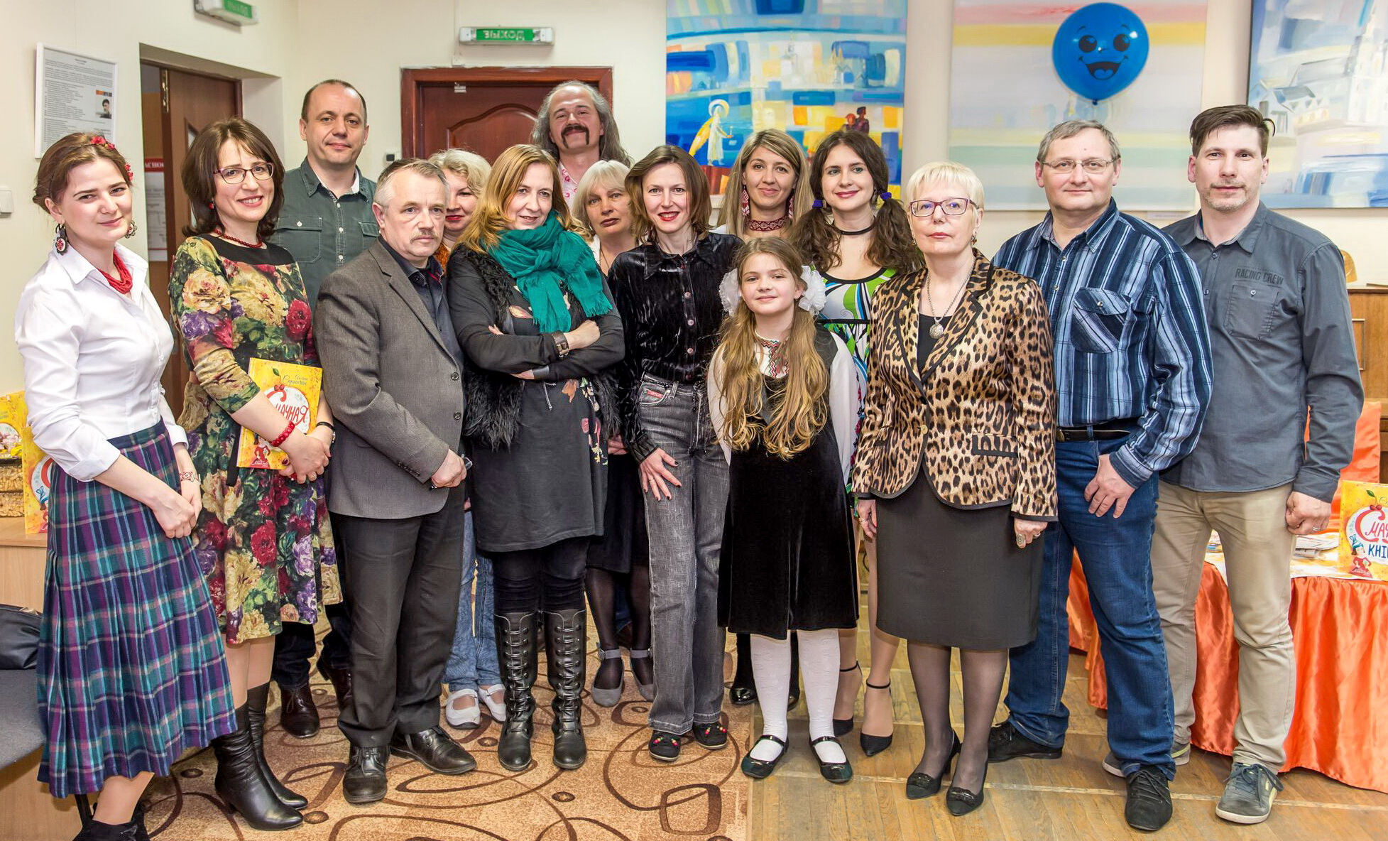 Удзельнікі прэзентацыі кнігі Аксаны Спрынчан "Смачная кніга"